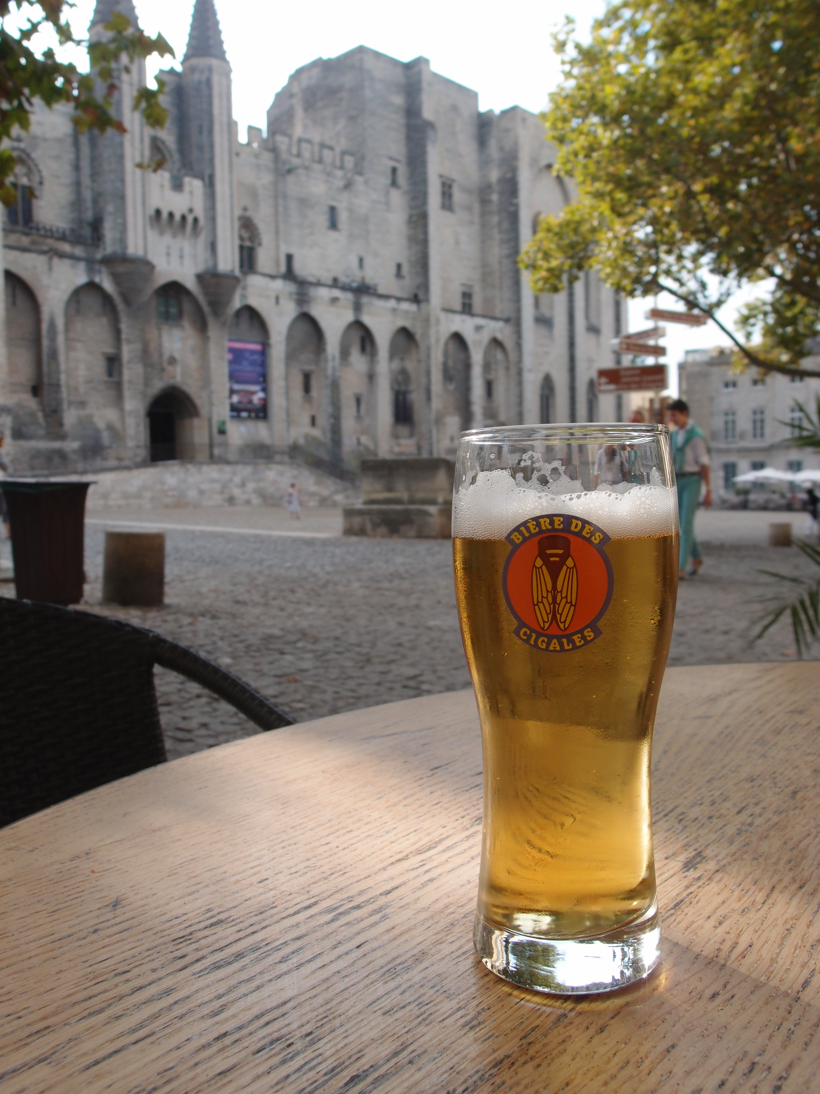 Bière Des Cigales (franz. Bier der Heineken-Gruppe) Datum: 05.09.2014 Urheber: M. Pfeiffer alias Gordito1869 Quelle: privates Fotoarchiv des Urhebers